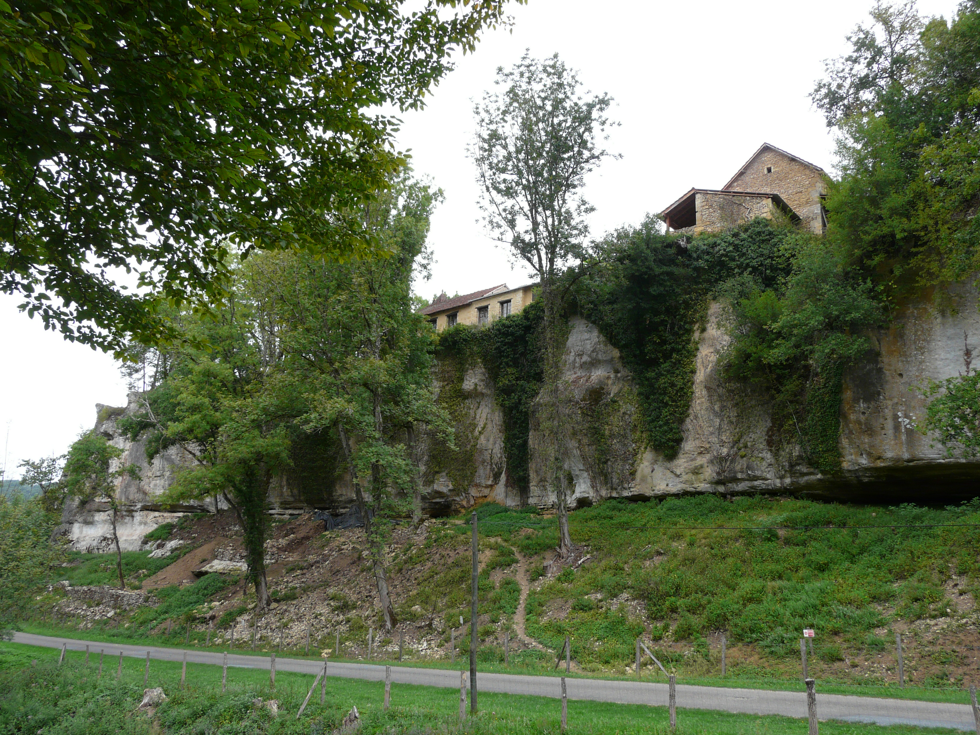 L'abri Blanchard I (à gauche) et l'abri Castanet (sur la droite), sites préhistoriques sur la commune de Sergeac, dans le vallon de Castel Merle, Dordogne, France. .